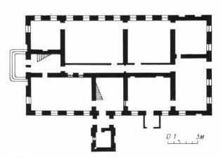 БДСГА. Адміністрацыйны корпус. План першага паверха.